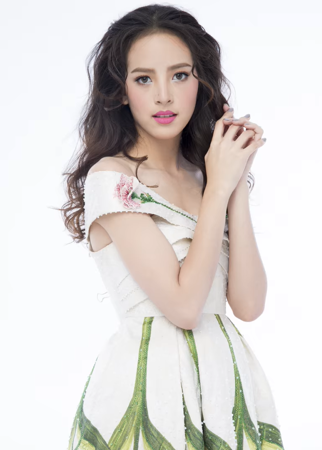 Nuttanicha Dungwattanawanich